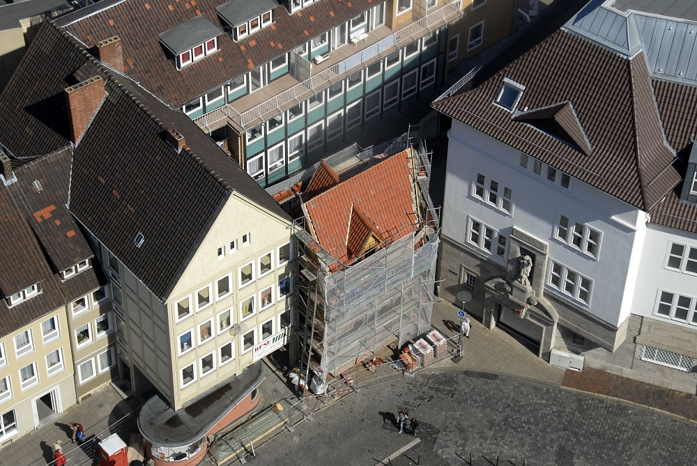 La Pfeilerhaus e la Umgestülpter Zuckerhut in costruzione, a Hildesheim, viste dal campanile di Sant'Andrea, aprile 2010